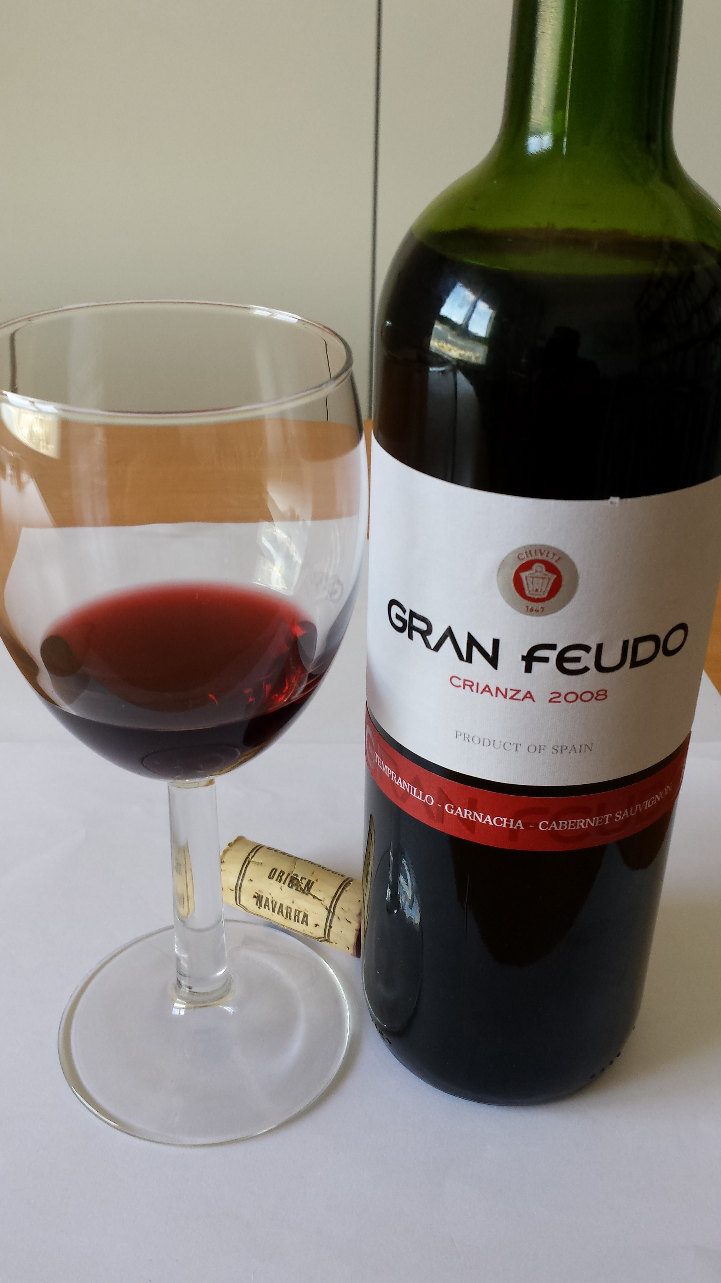 Vino de la DO Navarra resultado de la fusión de tempranillo, garnacha y cabernet sauvignon.